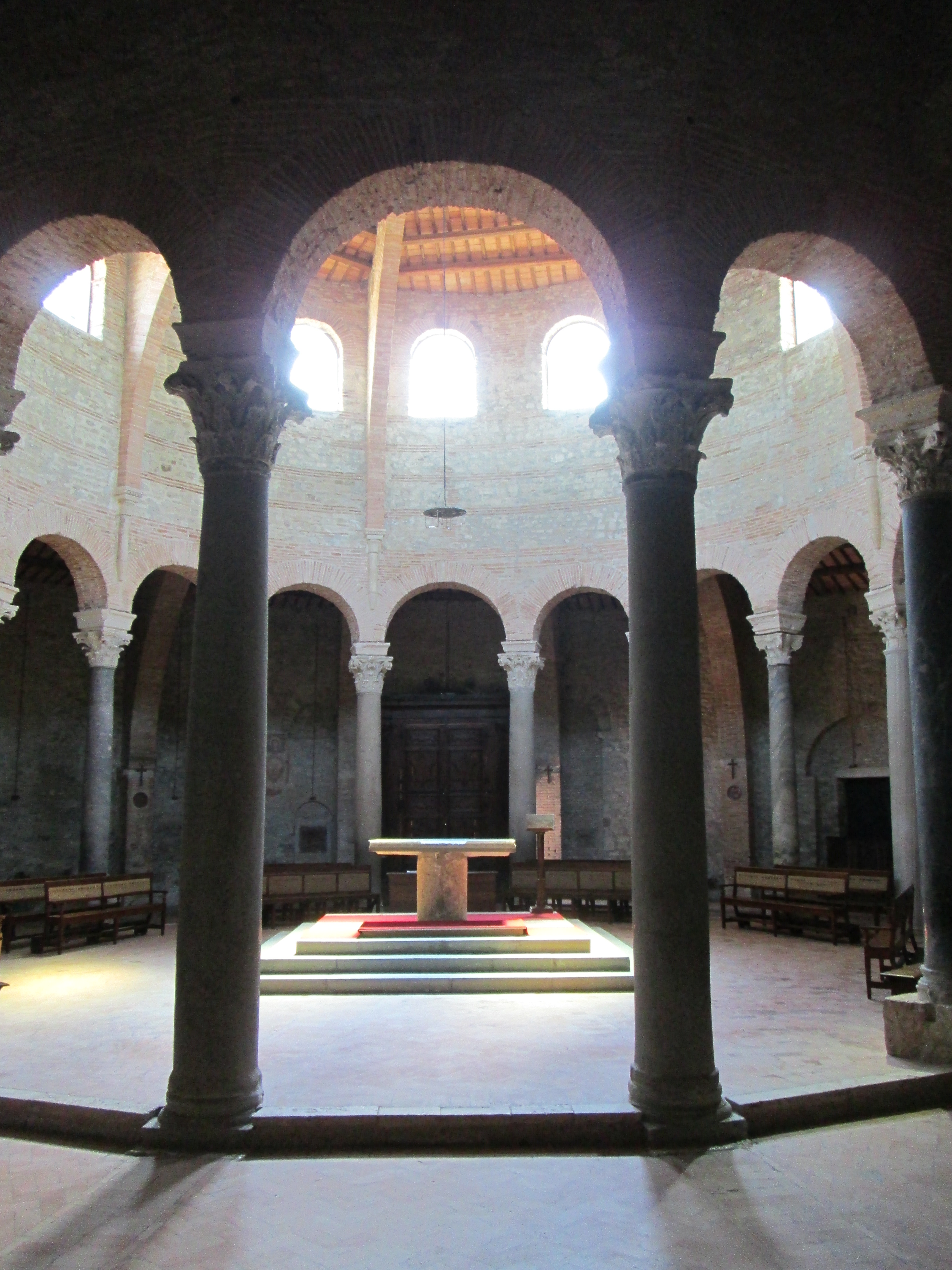 Cassero di Porta Sant'Angelo